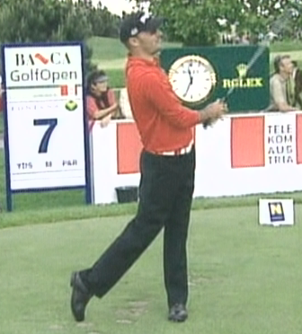 Bildbeschreibung: Gregory Havret bei den Austrian Open 2006 Quelle: eigene Aufnahme mit einer Handycam Datum: Juni 2006 Autor: Boss 14:32, 27 June 2006 (UTC) Lizenz: GNU